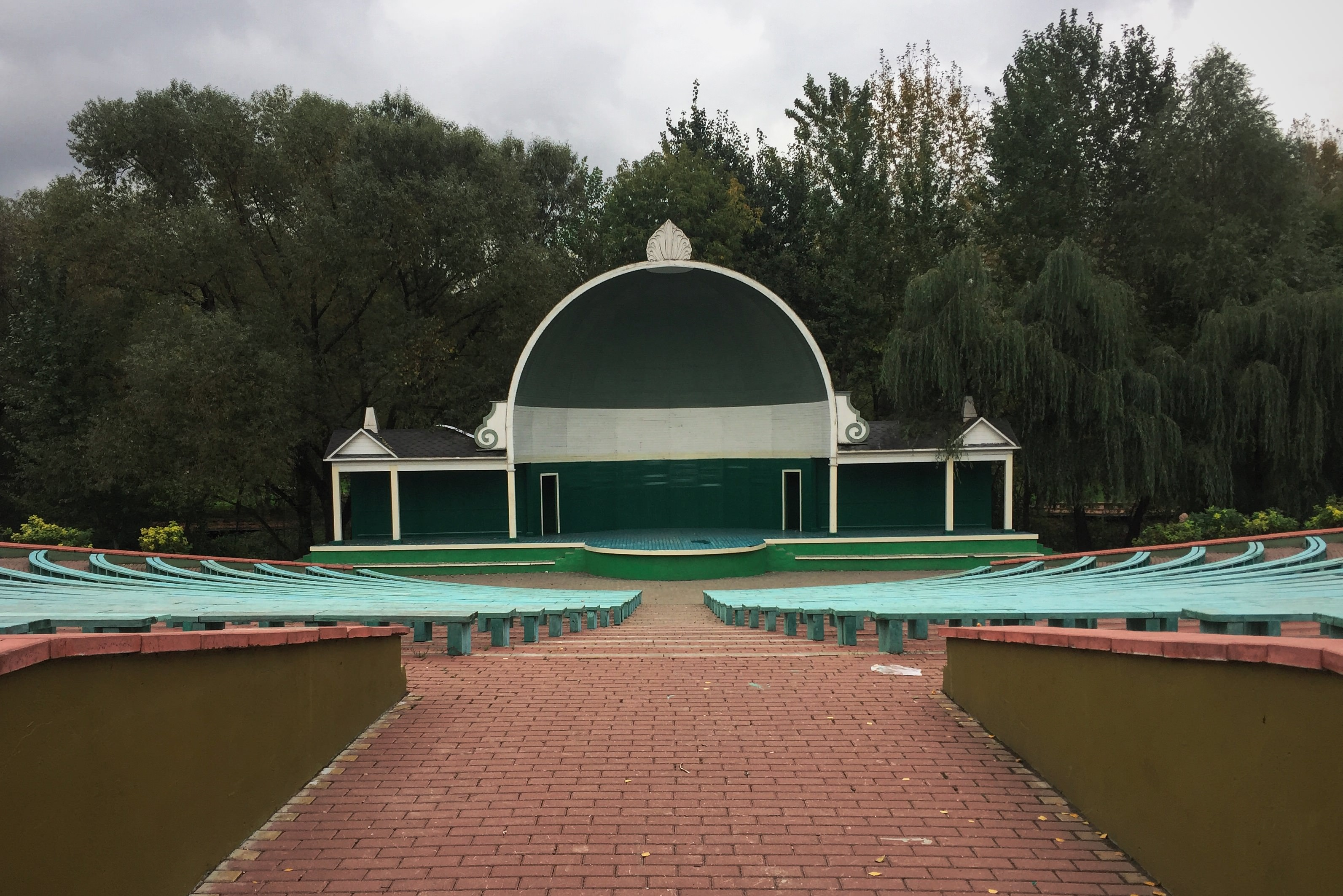 Проезд Дежнёва. Парк в долине Яузы. Эстрада "Певческое поле"